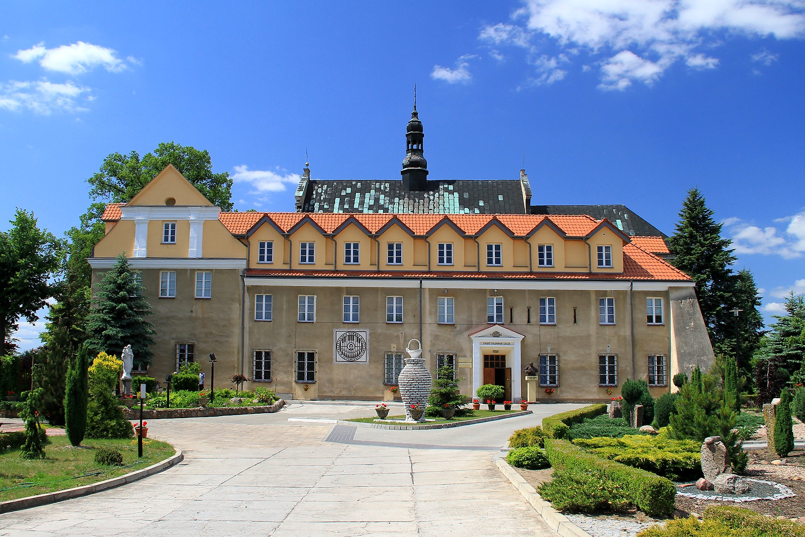 zespół klasztorny reformatów, ob. salezjanów, klasztor w Lutomiersku